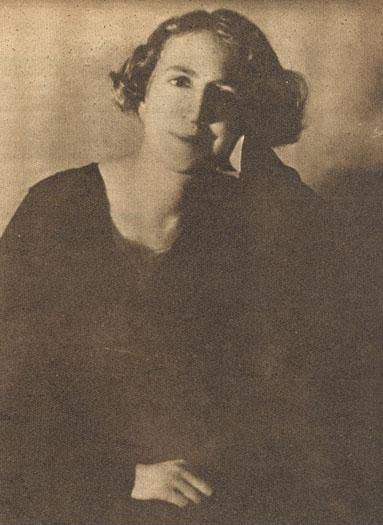 Inés Echeverría Bello (Santiago de Chile, 22 de diciembre de 1868 - Santiago, 13 de enero de 1949) fue una escritora chilena.